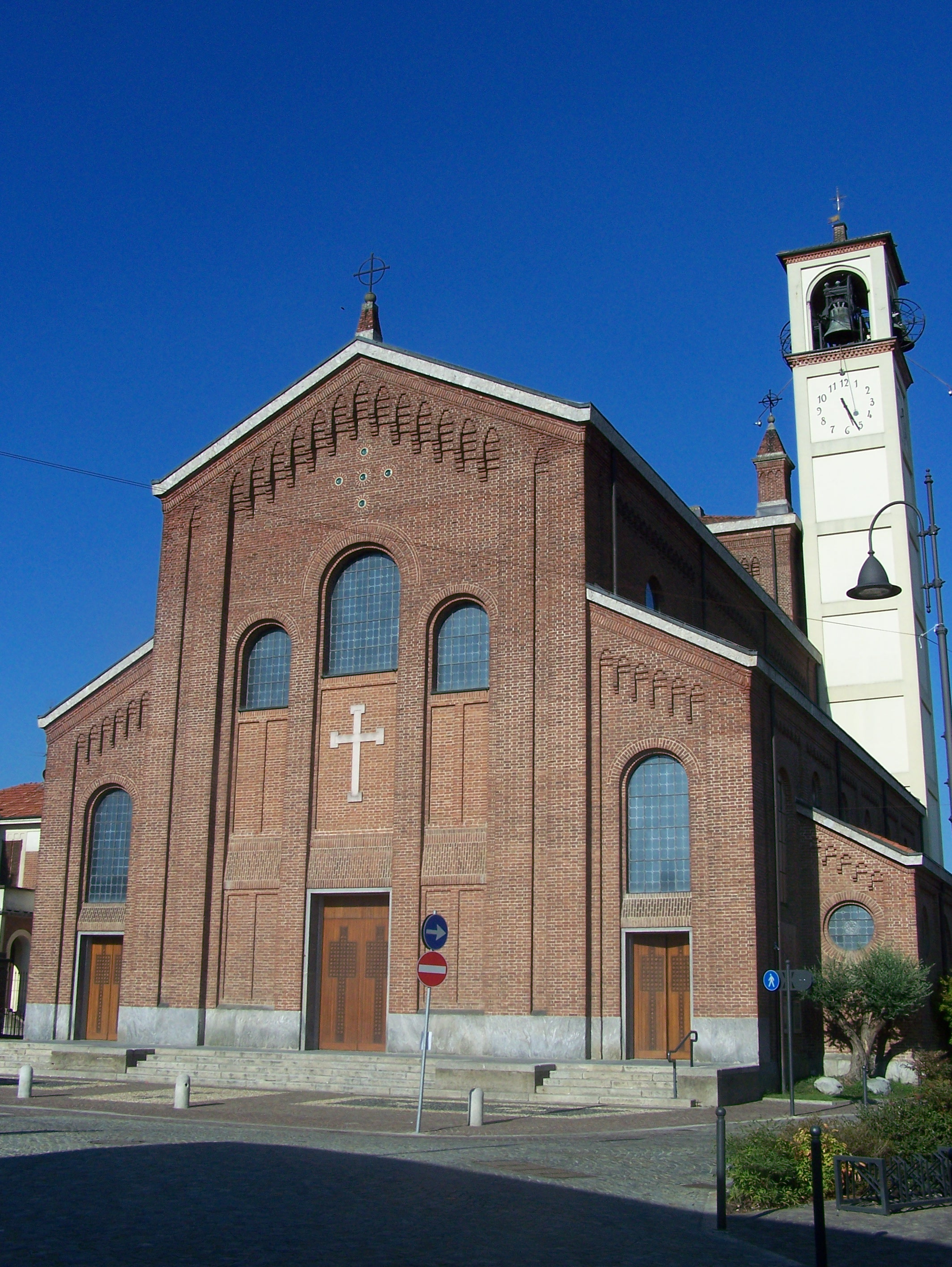 Chiesa parrocchiale di San Giorgio di Albairate (MI) - Italy